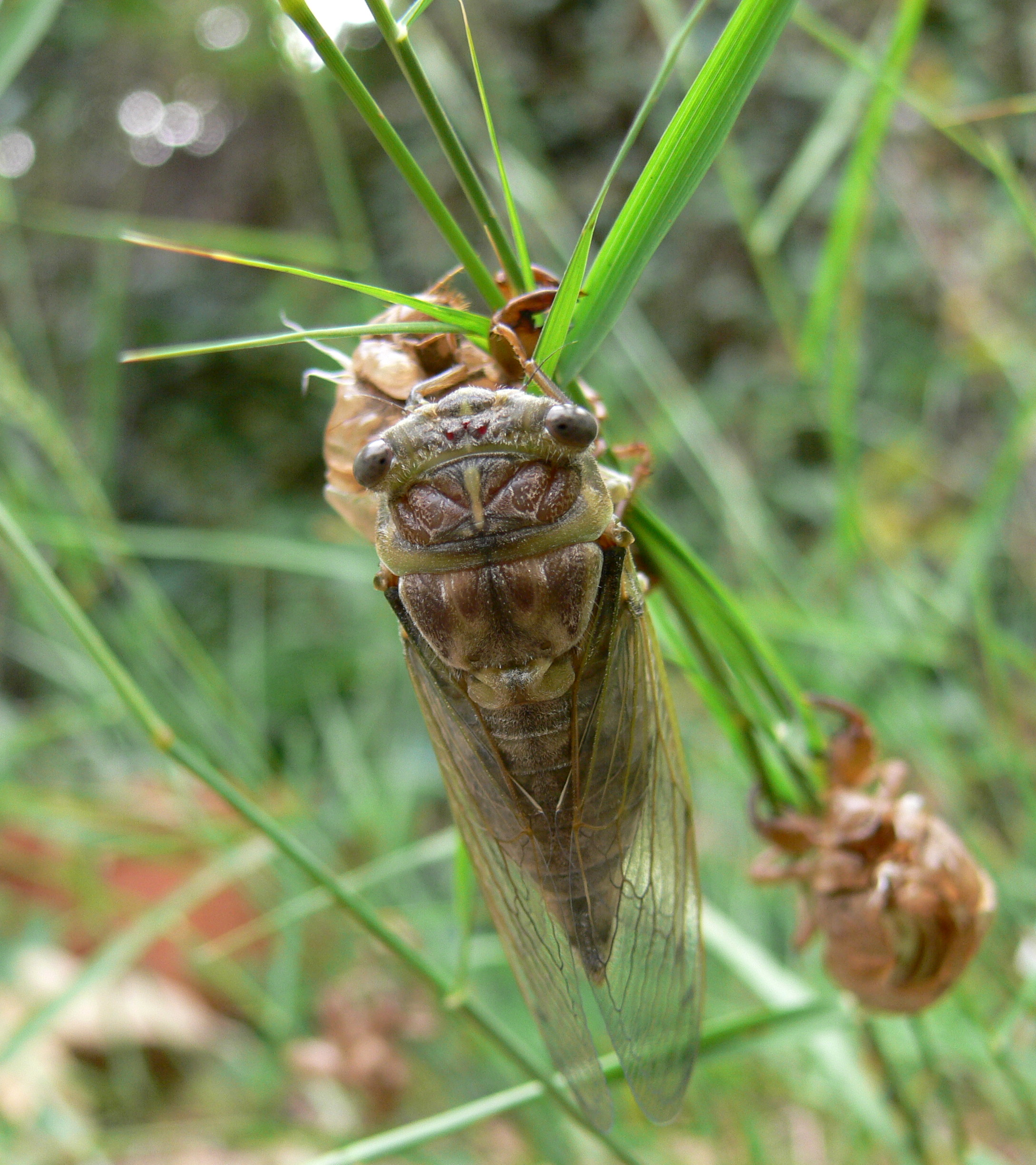 Cigale plébéienne Lyristes plebejus (Scopoli 1763), Var (France). La jeune cigale vient de quitter l'exuvie (mue), elle n'a pas encore sa couleur définitive (grise) et fait sécher ses ailes quelques dizaines de minutes avant de pouvoir s'envoler.